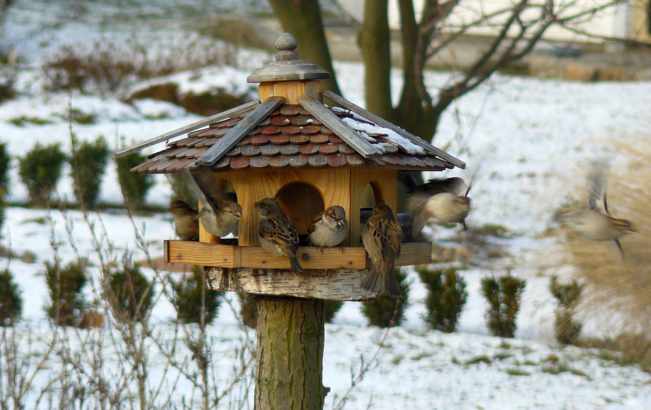 Vogelhäuschen in unserem Garten